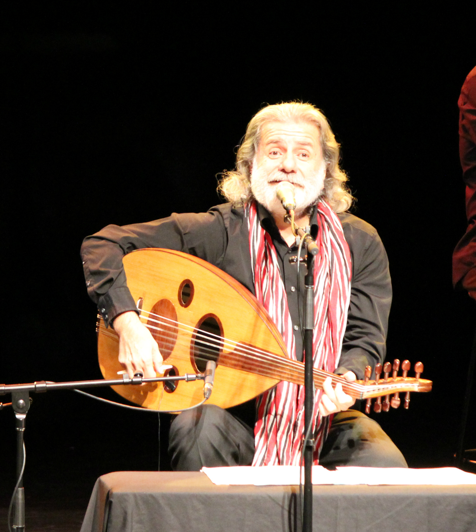 مارسيل خليفة يعزف على العود ويغني في حفلة أوتوا في 10 أيار 2014